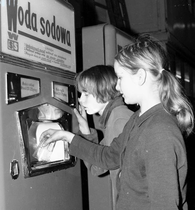 Spółdzielczy Dom Handlowy "Koszyki" Warszawskiej Spółdzielni Spożywców "Społem" przy ul. Koszykowej w Warszawie. Fragment wnętrza domu handlowego. Dziewczynki przy automacie z wodą sodową. Warszawa 1969.